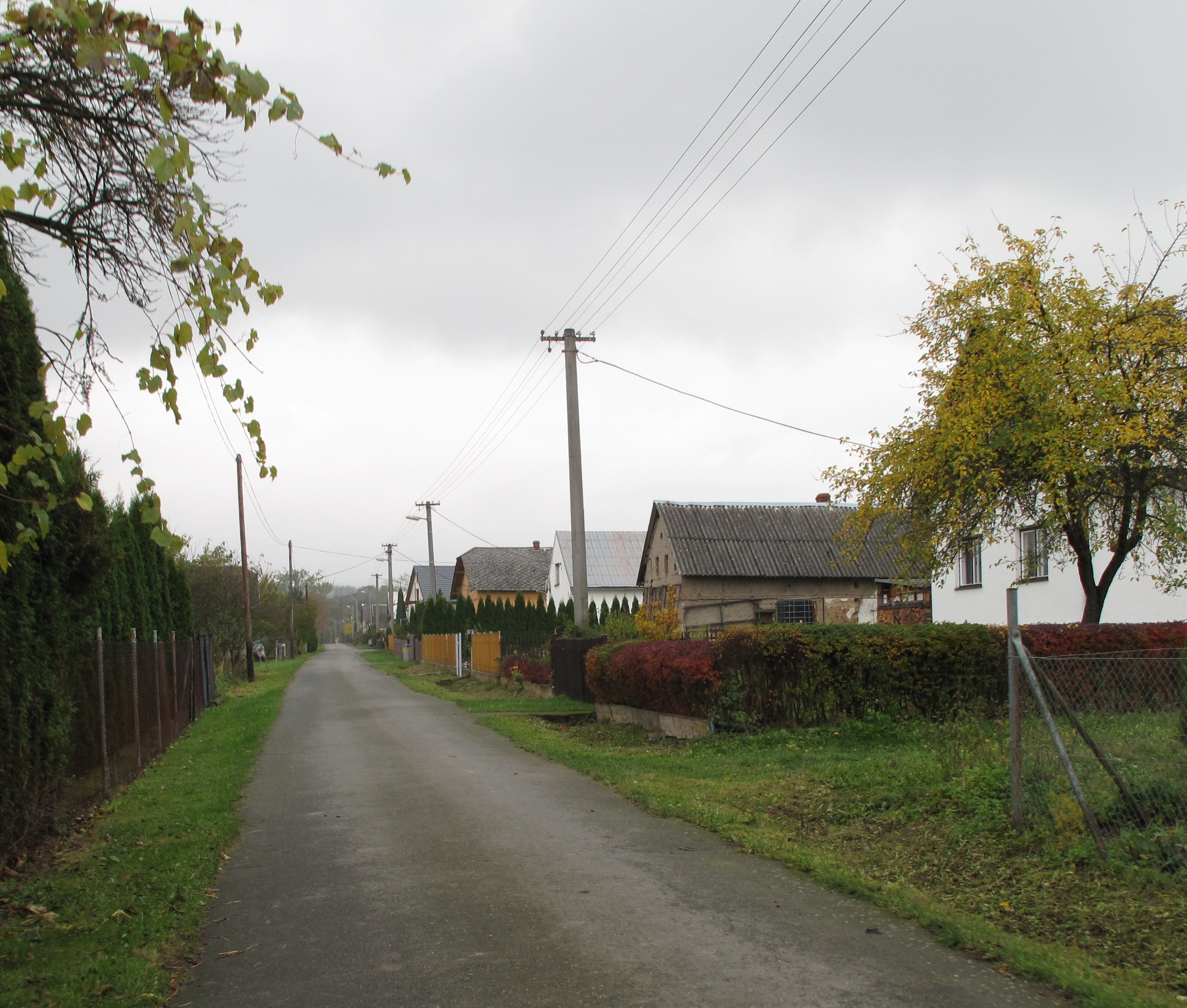 Amalín. Okres Bruntál, Česká republika.